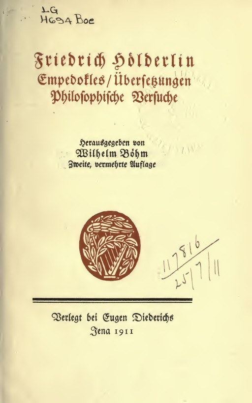 Titelseite / Title page